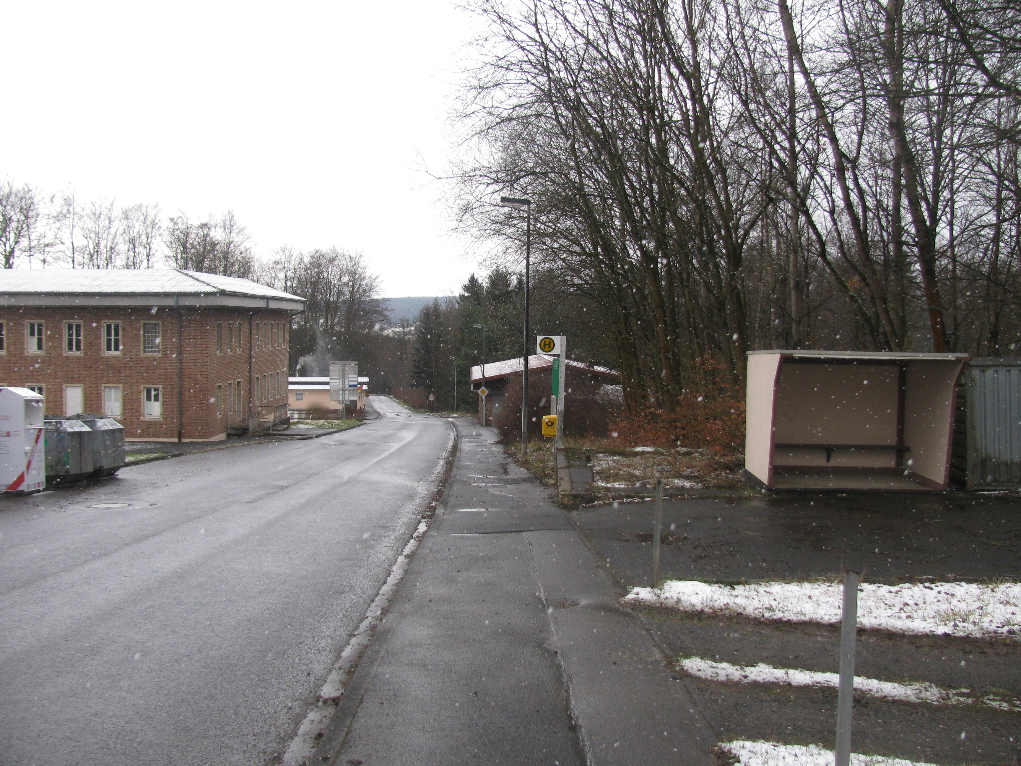 die Bushaltestelle Post in Hessisch-Lichtenau-Hirschhagen